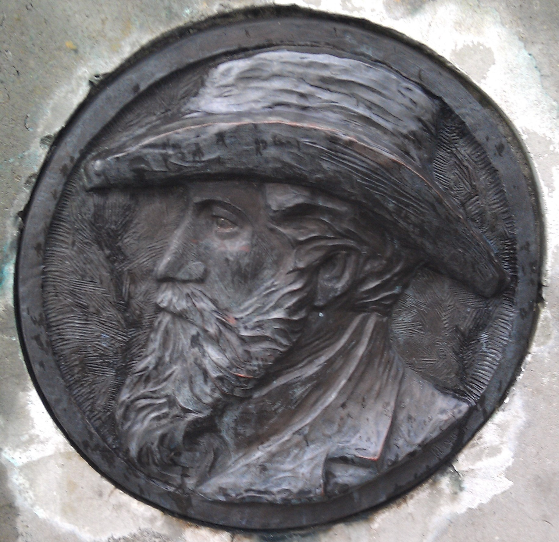 Рельефный портрет Германа Клаасса на памятнике в Калининградском зоопарке